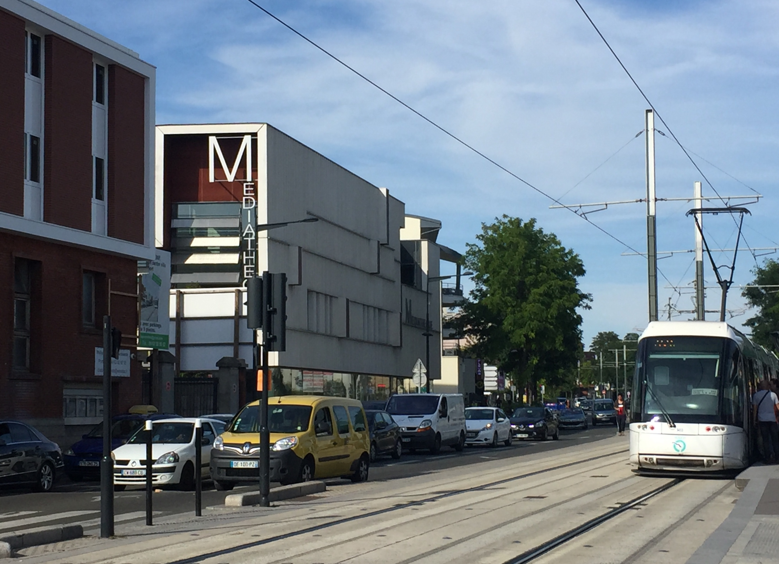 Vue de la façade de la médiathèque de Pierrefitte-sur-Seine, le long de l'ex-RN1 en août 2019. A gauche, l'aile du bâtiment de la Poste. A droite, le tramway à l'arrêt Alcide d'Orbigny.